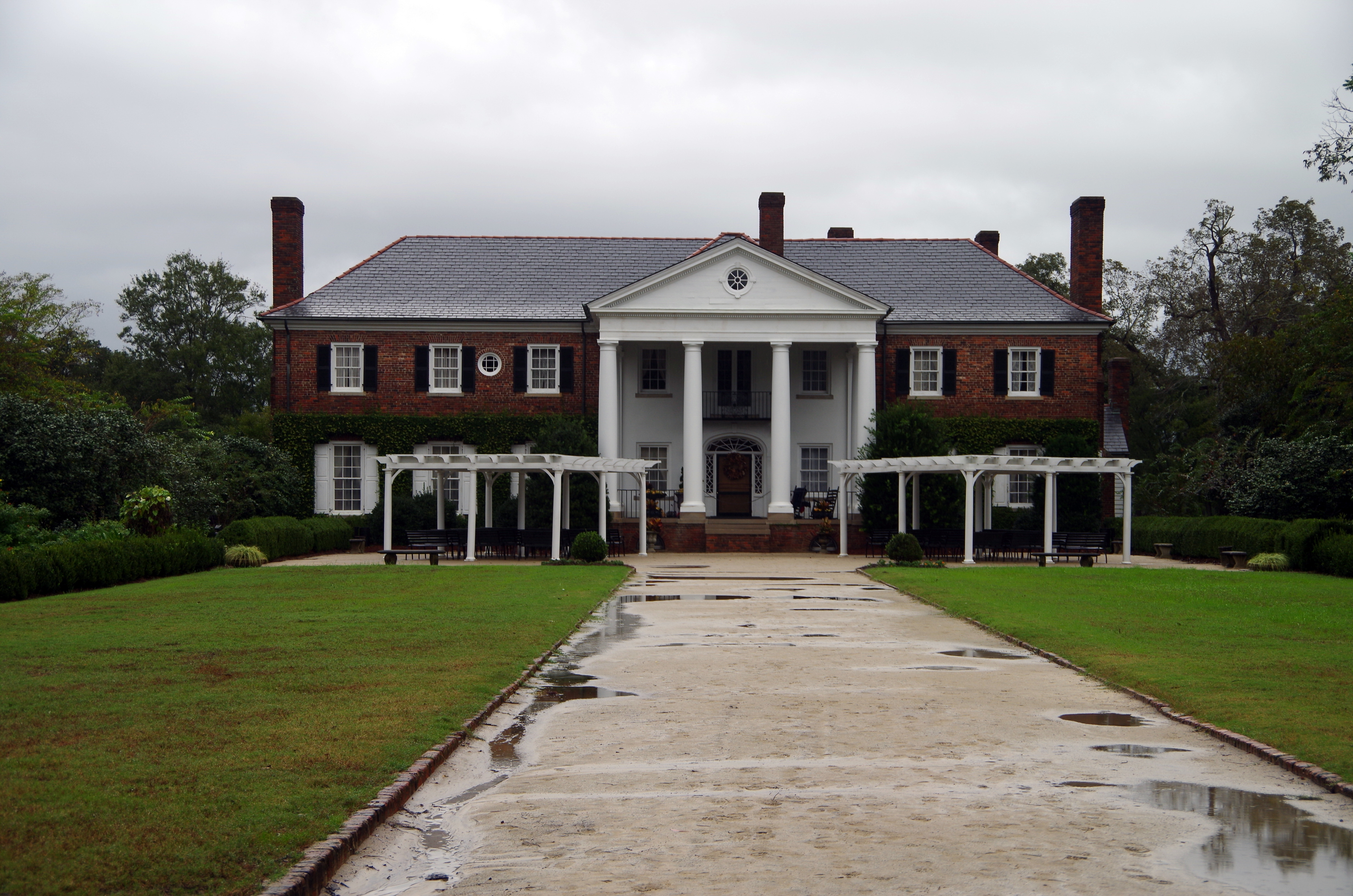 Herrenhaus Boone Hall